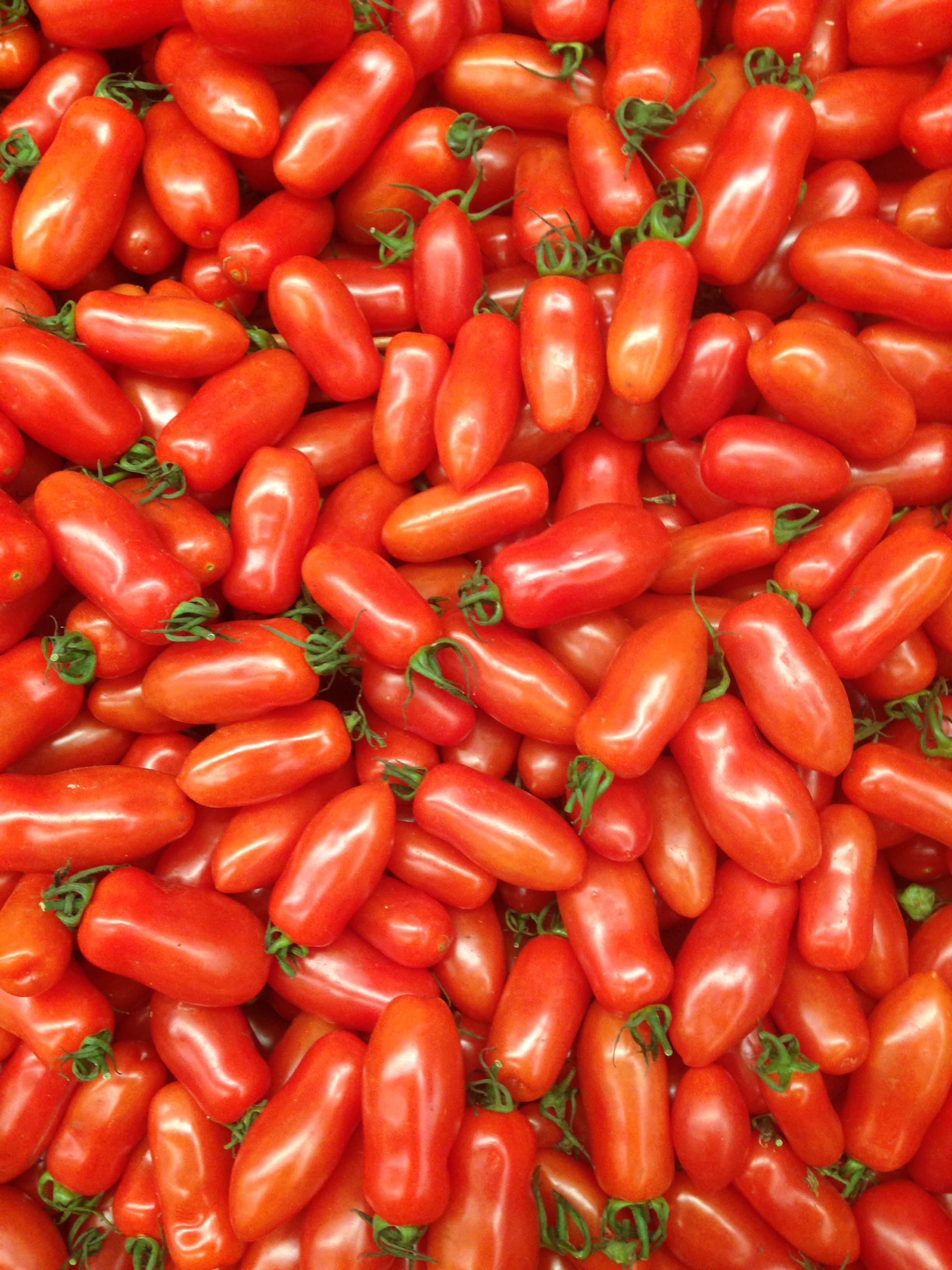 çeşitli meyve ve sebzelerden görüntüler